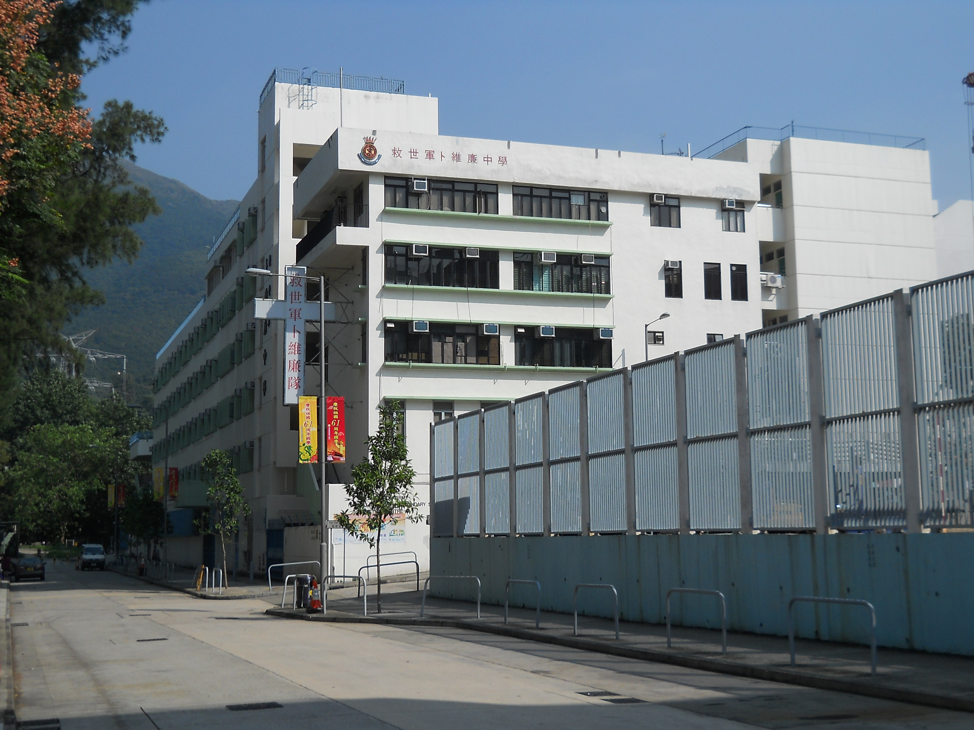 中文（香港）: 救世軍卜維廉中學